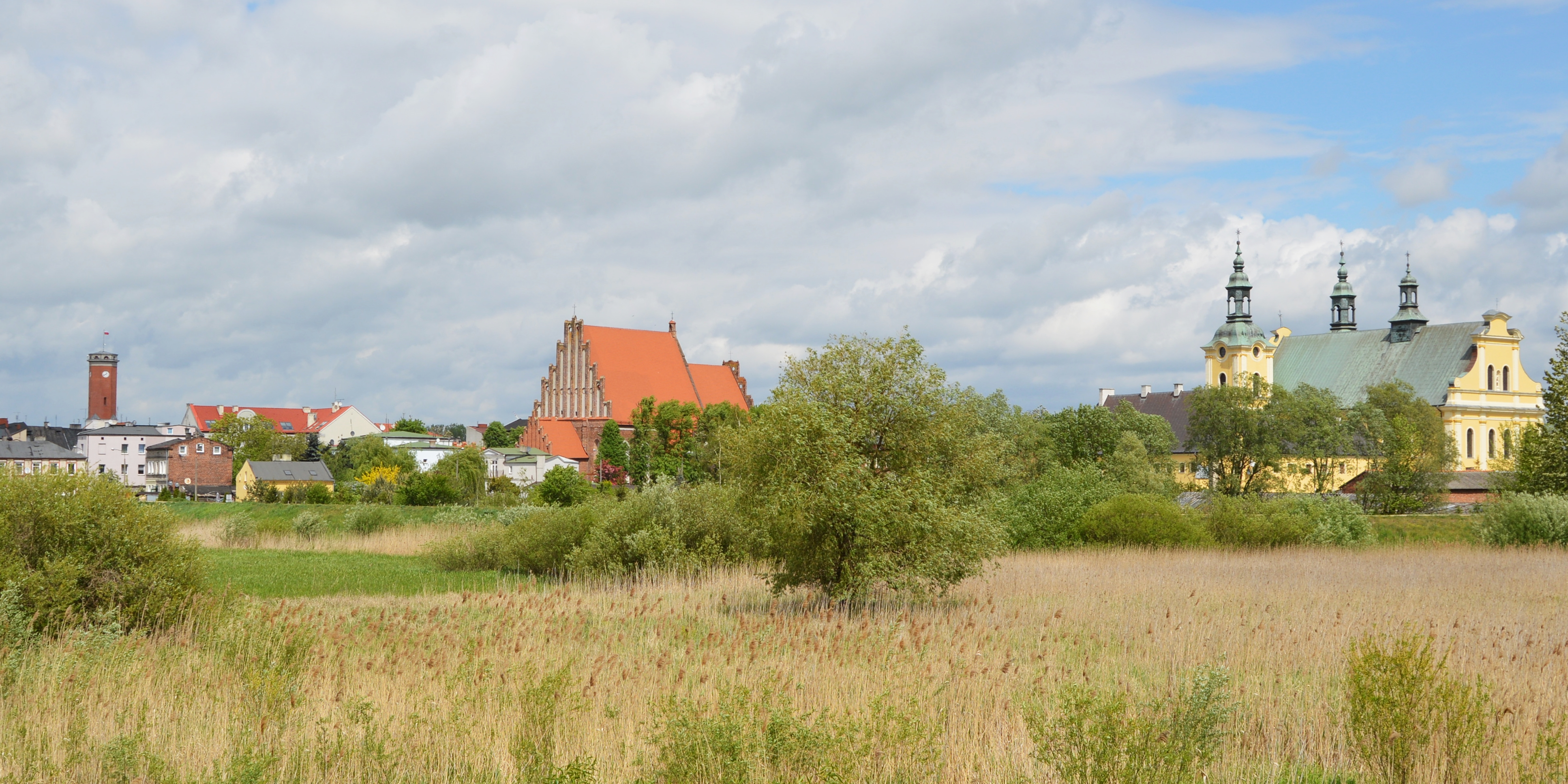 panorama Starego Miasta w Kole - od lewej: wieża ratusza, kościół Podwyższenia Krzyża Świętego, kościół Nawiedzenia Najświętszej Maryi Panny i klasztor bernardynów